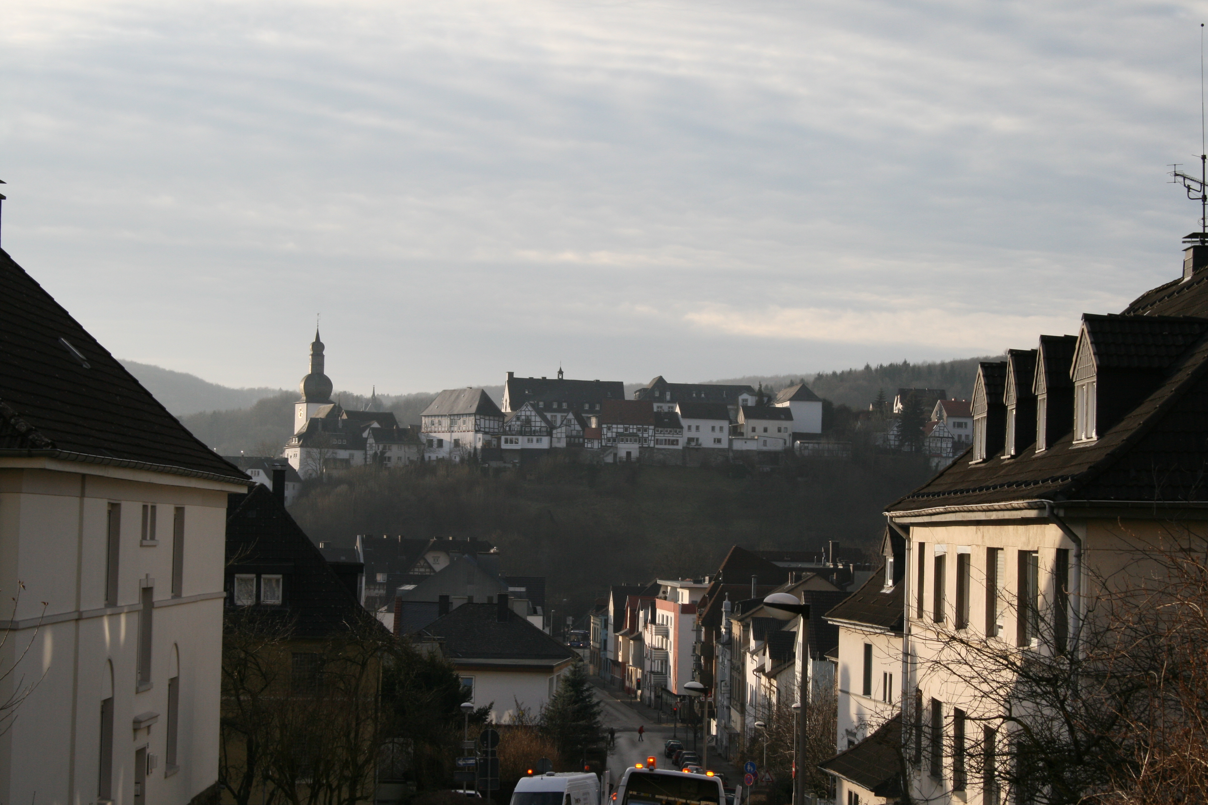 Blick auf die Arnsberger Altstadt von der Henzestrasse aus